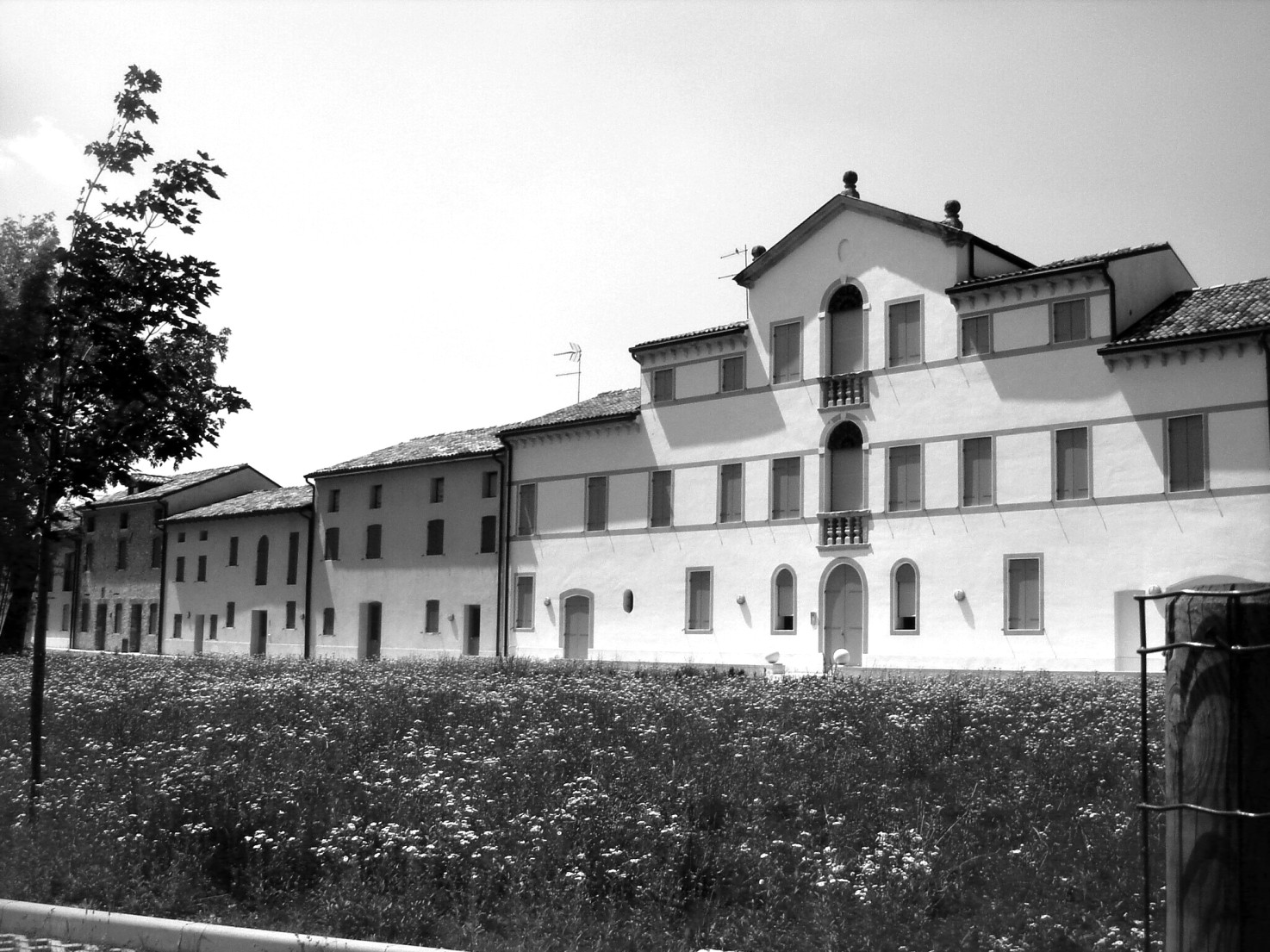 Castello Roganzuolo (San Fior, Treviso, Italia): il complesso della settecentesca Villa Liccer negli anni '70 è stato vittima dell'edilizia industriale, che l'ha inghiottito: in quella che fino alla prima metà del Novecento era la tenuta dell'elegante villa sorgono capannoni e il parcheggio degli automezzi, l'impatto ambientale dei quali, in pochi anni, ha reso irriconoscibile l'assetto territoriale che nei secoli si era costituito. Neorestaurata (2008/9), la villa ha riacquistato parte dello splendore originario.